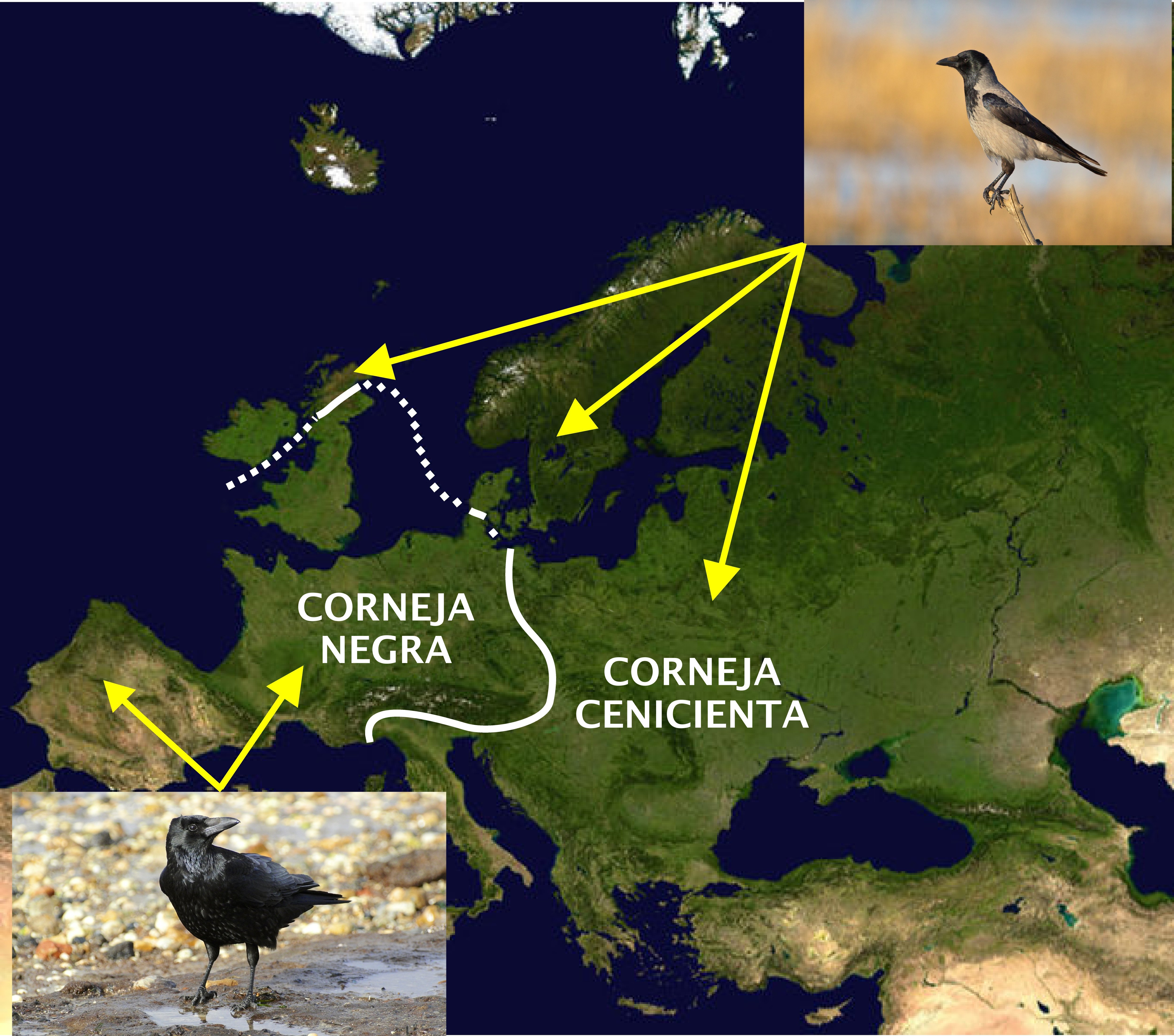 Una imagen creada usando una combinación de imágenes de Wikimedia Commons (File:Europe satellite globe.jpg; File:Corvus corone -near Canford Cliffs, Poole, England-8.jpg; y File:Nebelkrähe Corvus cornix.jpg) para ilustrar la distribución de la corneja negra "Corvus corone y de la corneja cenicienta Corvus cornix en toda Europa. La línea blanca indica la zona de contacto entre las dos especies: las cornejas negras se encuentran al oeste y al sur de la línea; y cornejas cenicientas al este y al norte. Una segunda versión de este mapa, File:Distribution of hooded and carrion crows across Europe by their Latin names.JPG con solo los nombres latinos de las aves mencionadas, se puede utilizar en las Wikipedias en otros idiomas además del inglés o el español.